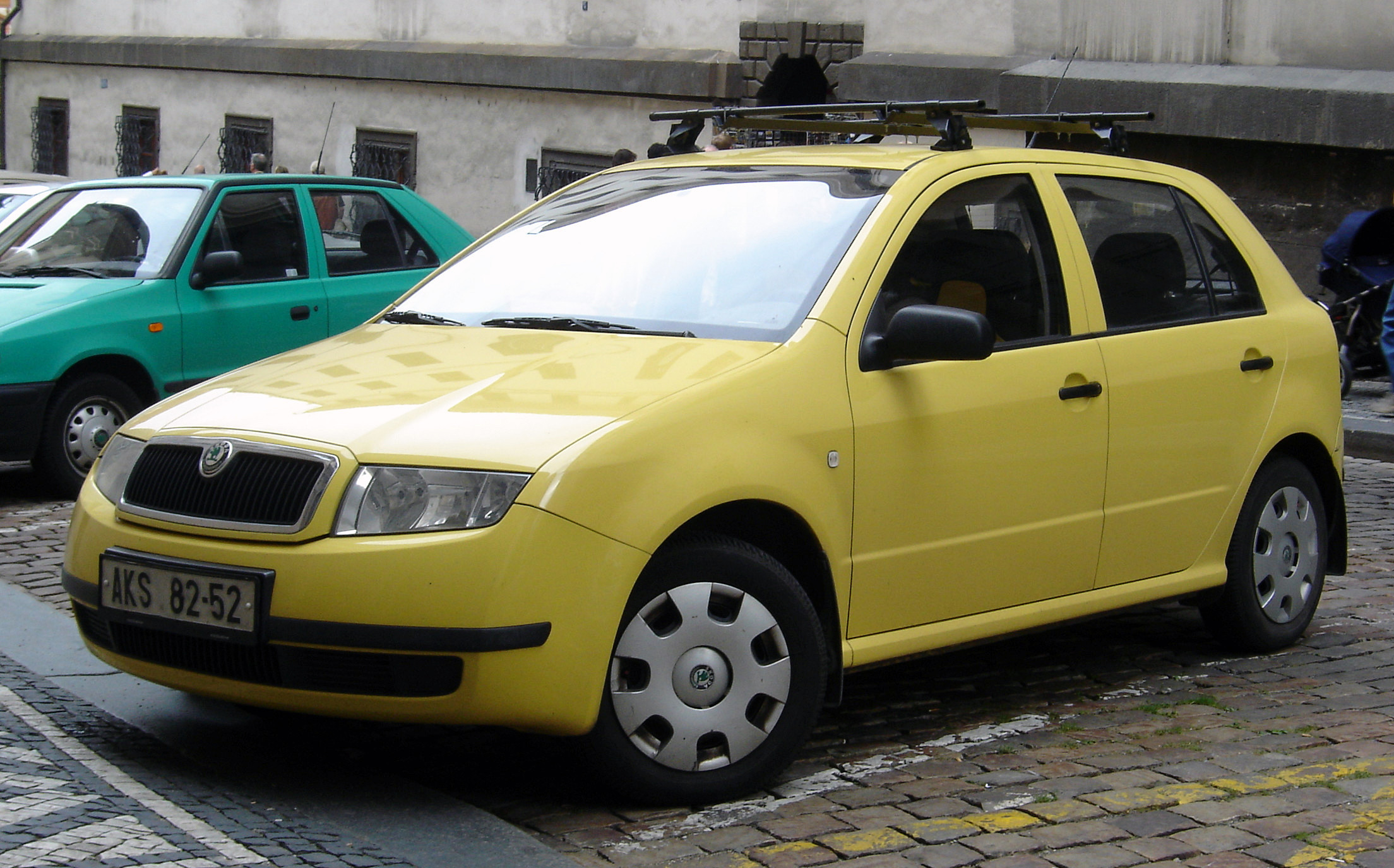 Škoda Fabiayellow skoda